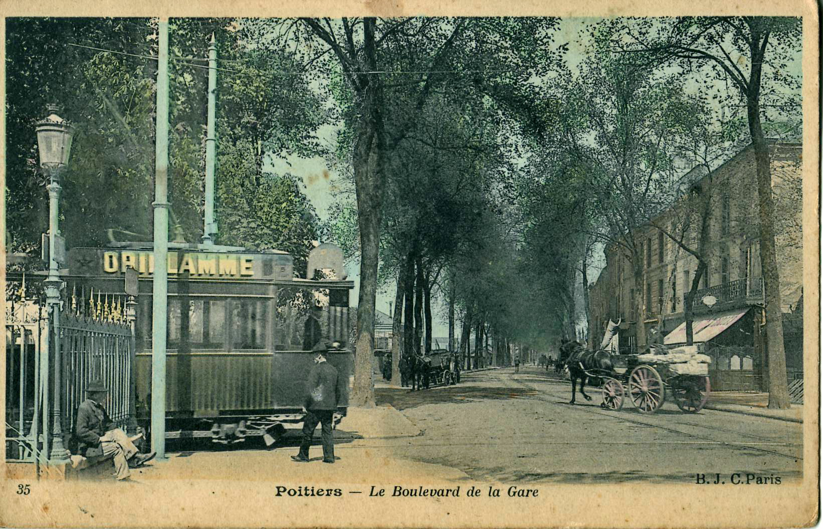 Carte postale ancienne éditée par B. J. C. à Paris, n°35 : POITIERS - Le Boulevard de la Gare.